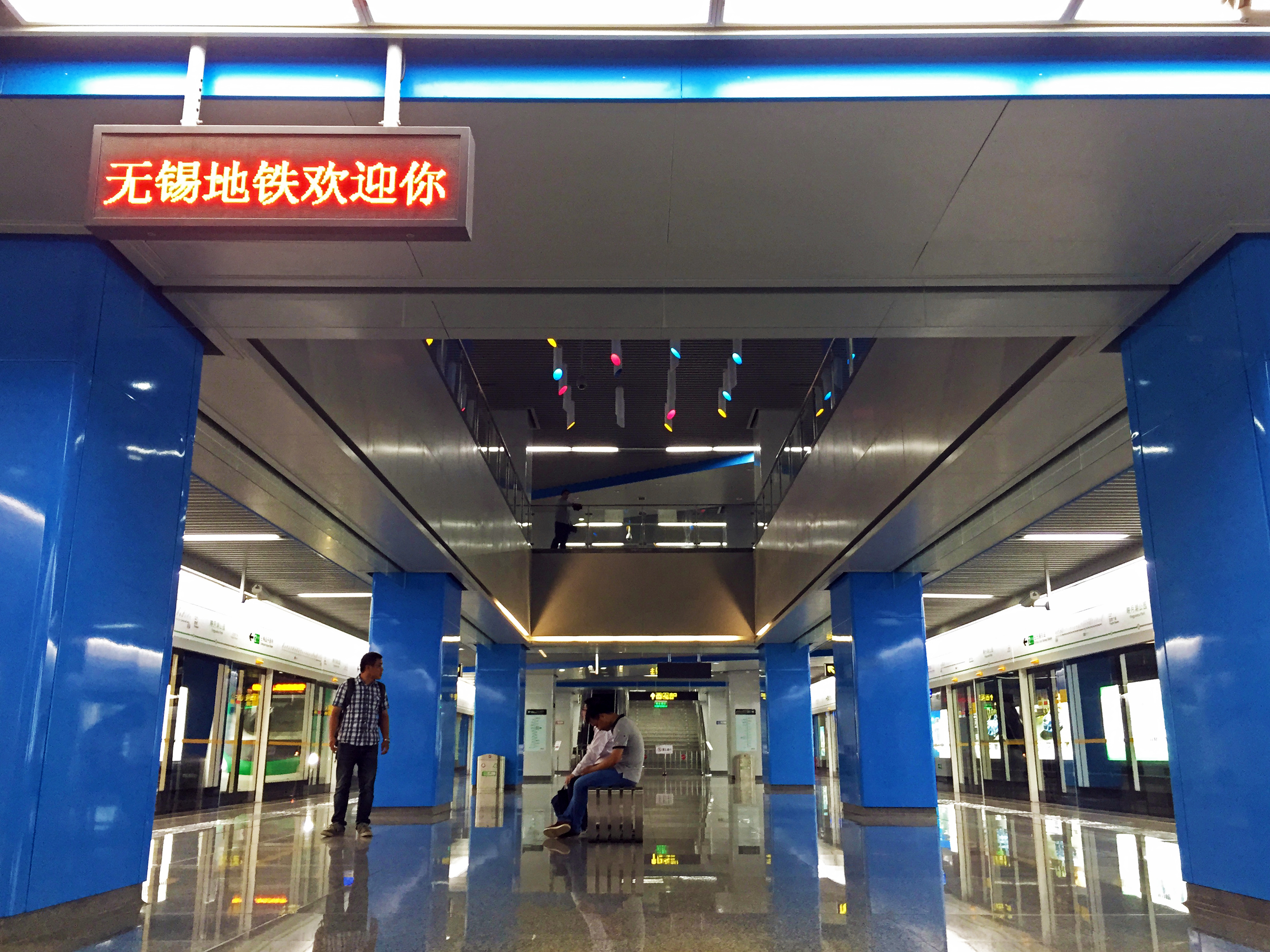 無錫地鐵映月湖公園站2號線站臺